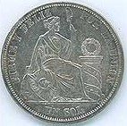 Moneda de plata que es parte de mi colección. Fue la moneda oficial de Perú entre 1863 y 1897.